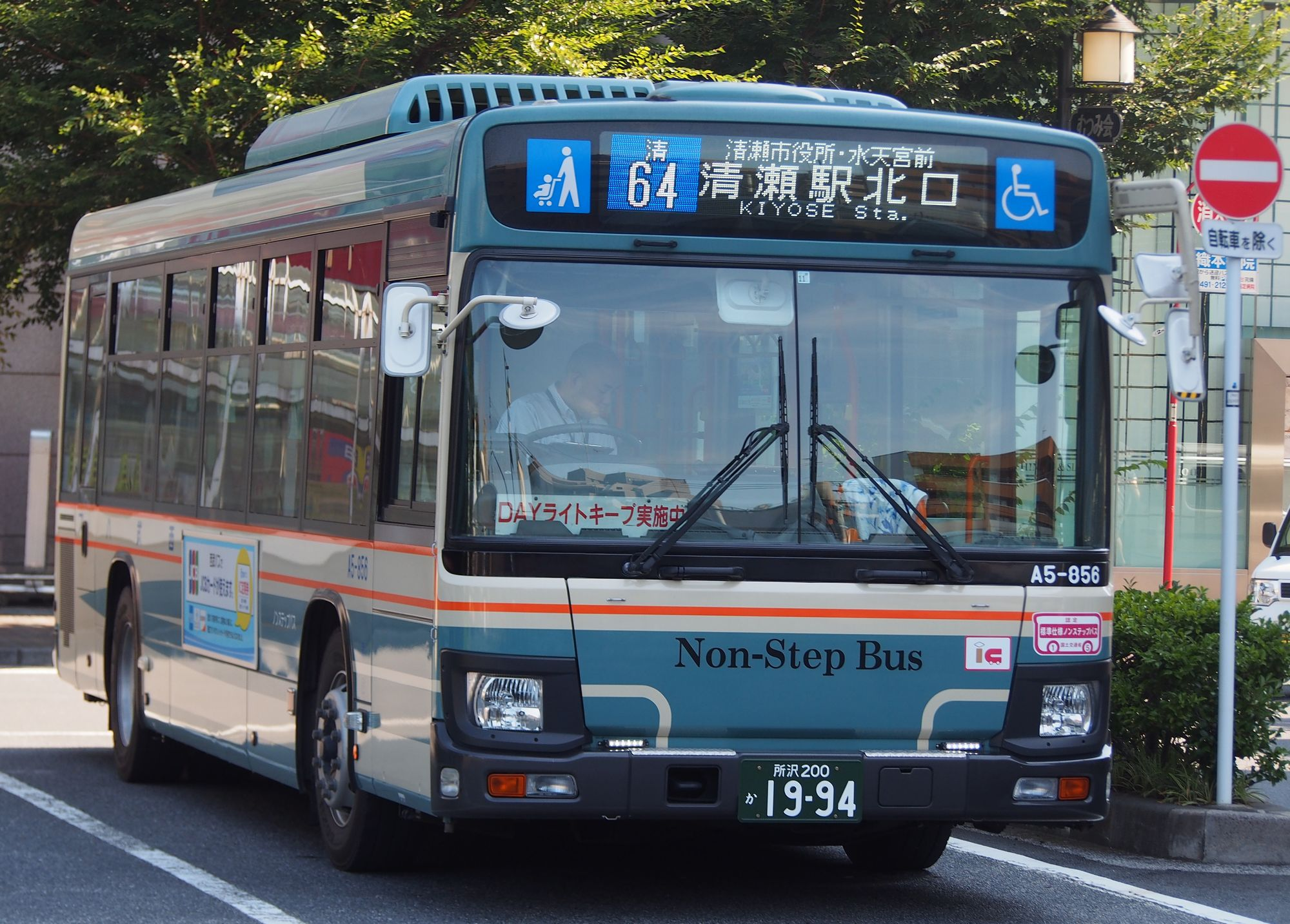 台田団地線は、写真の大型車（新エルガ A5-856）を含めて充当されることも増えている。